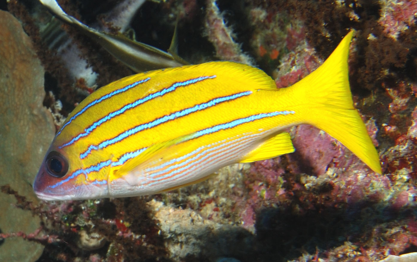 Kasmira snapper